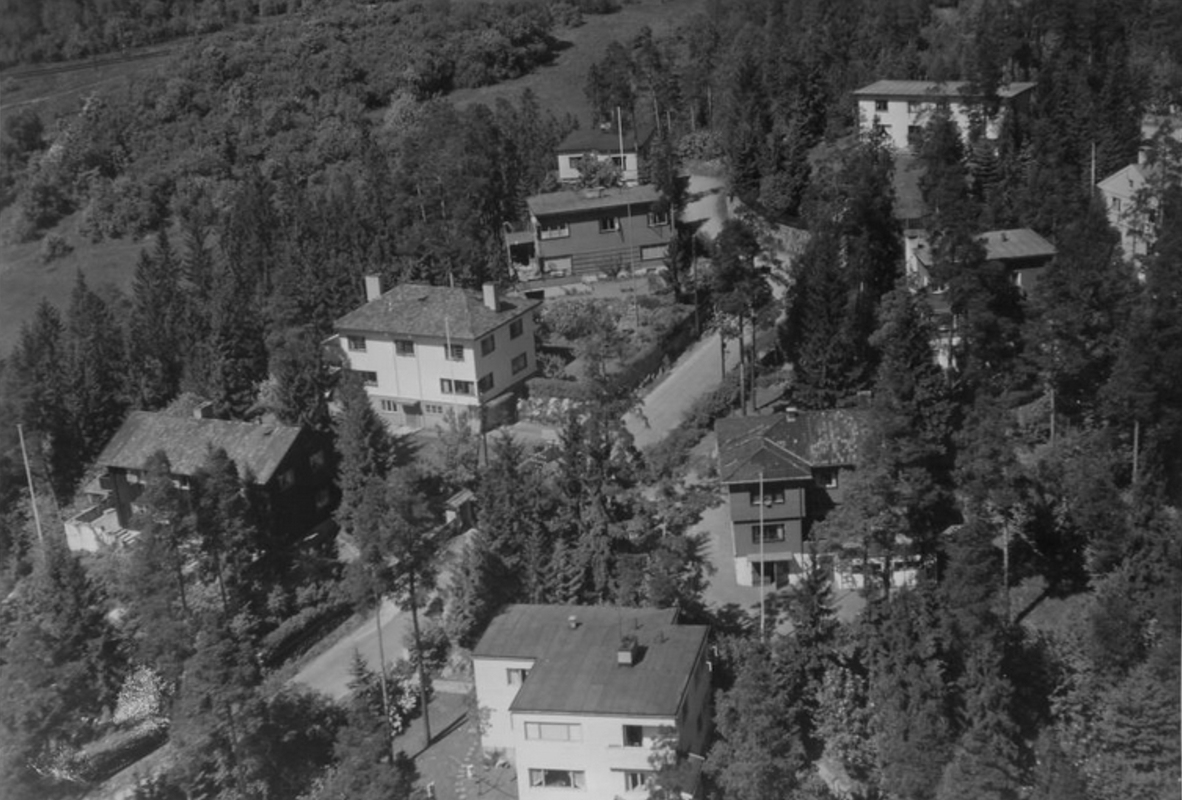 Sørbyhaugen anno 1954